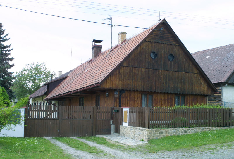 Čp. 8, Hlince.